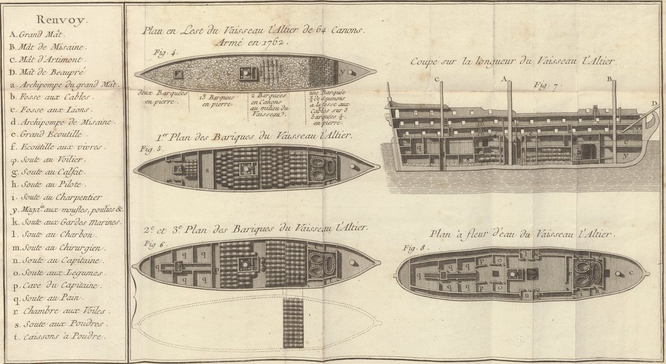 Divers plans en coupe du vaisseau de ligne français de 64 canons l'Altier, lancé en 1762. Plan publié en 1814 dans les Principes fondamentaux de l'arrimage des vaisseaux. (Marine de Louis XV).